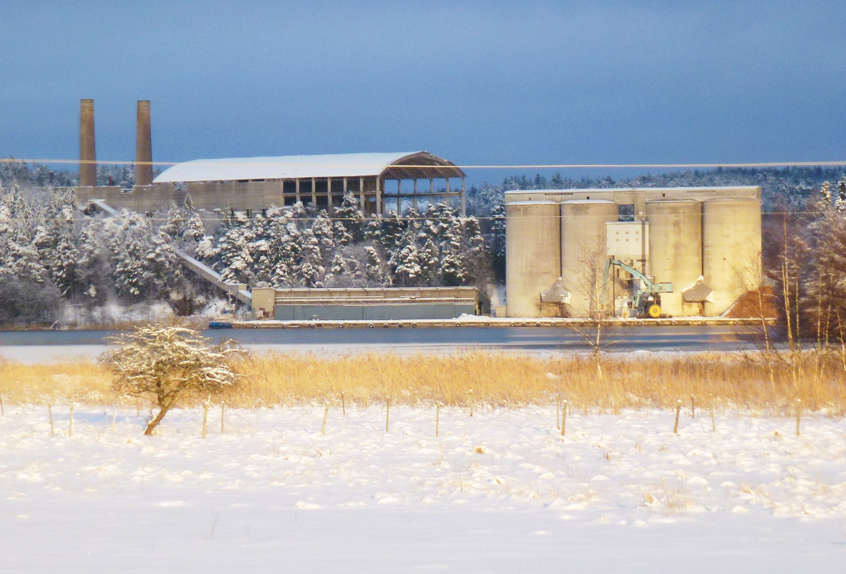 Stora Vika cementfabrik